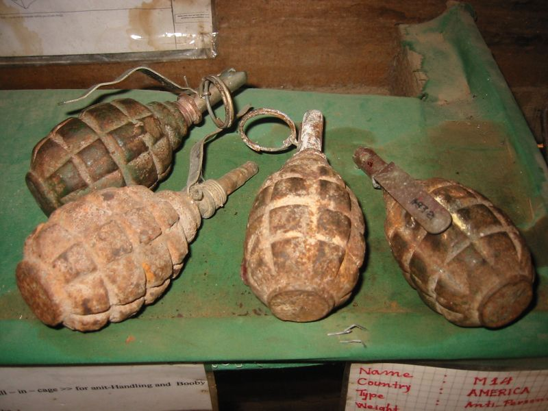 Soviet F1 Hand Grenades.